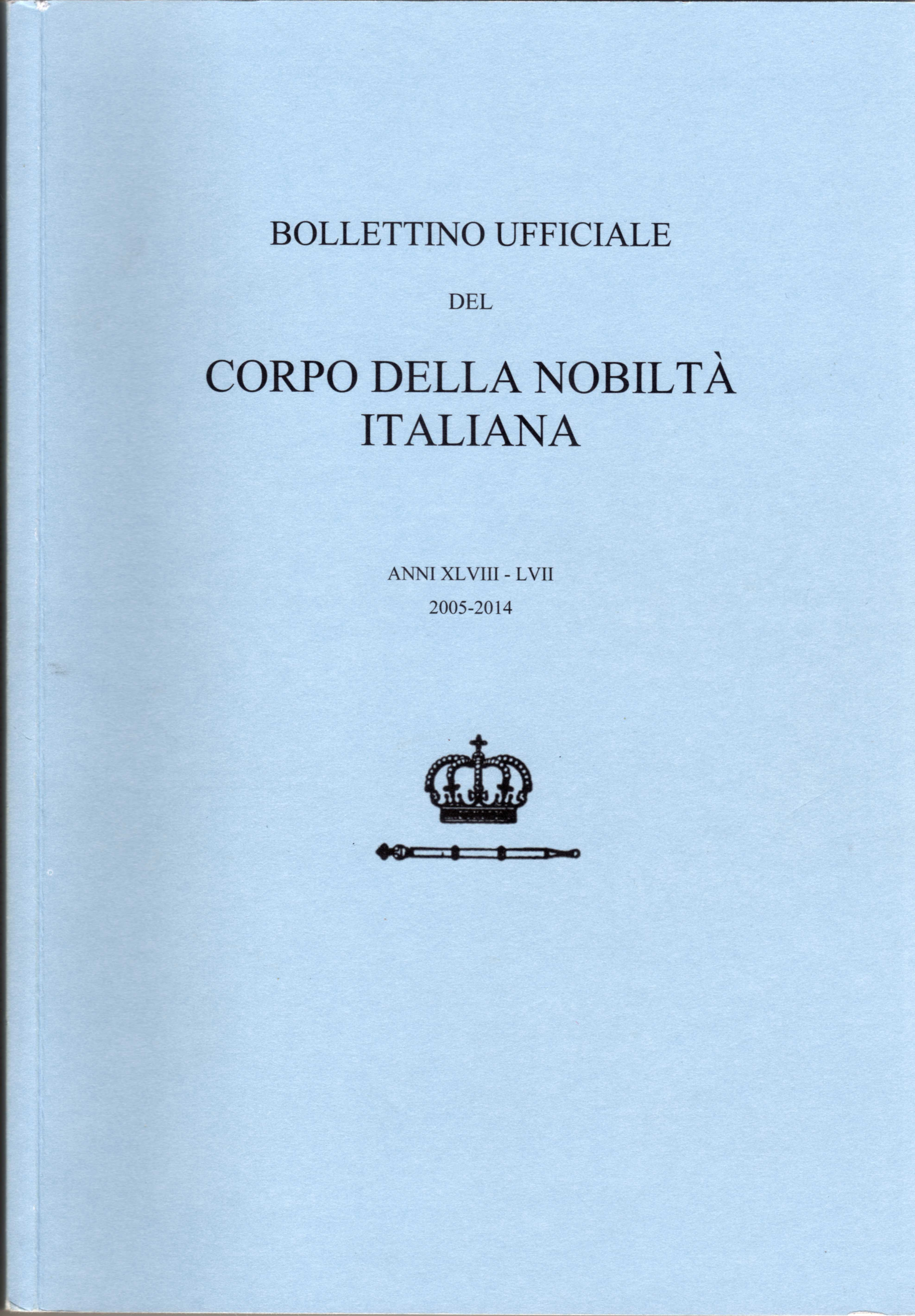 Bollettino Ufficiale del Corpo della Nobiltà Italiana 2005-2014